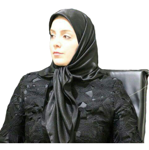 مرجان کاوسی